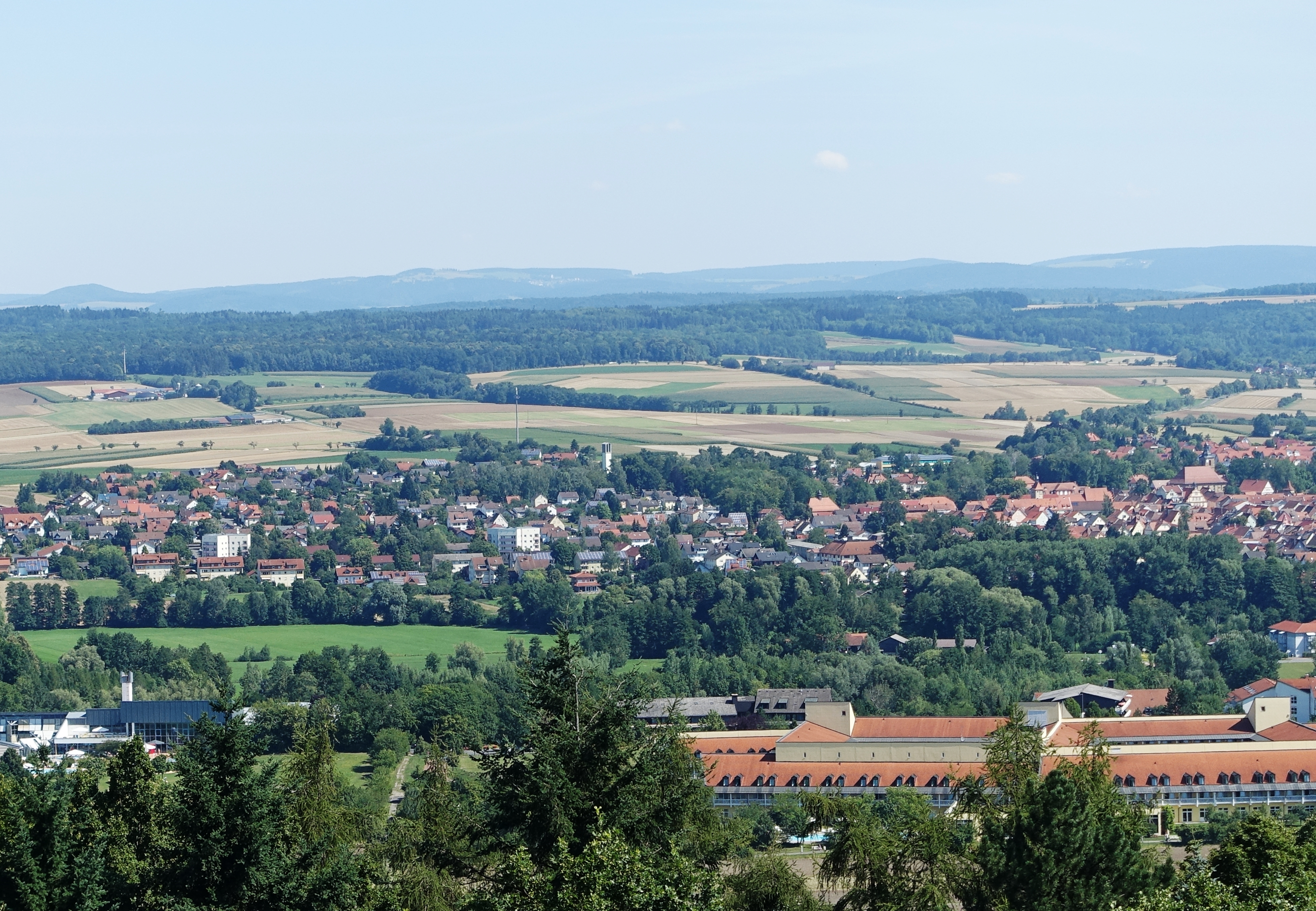 Blick auf Bad Rodach von der Henneberger Warte